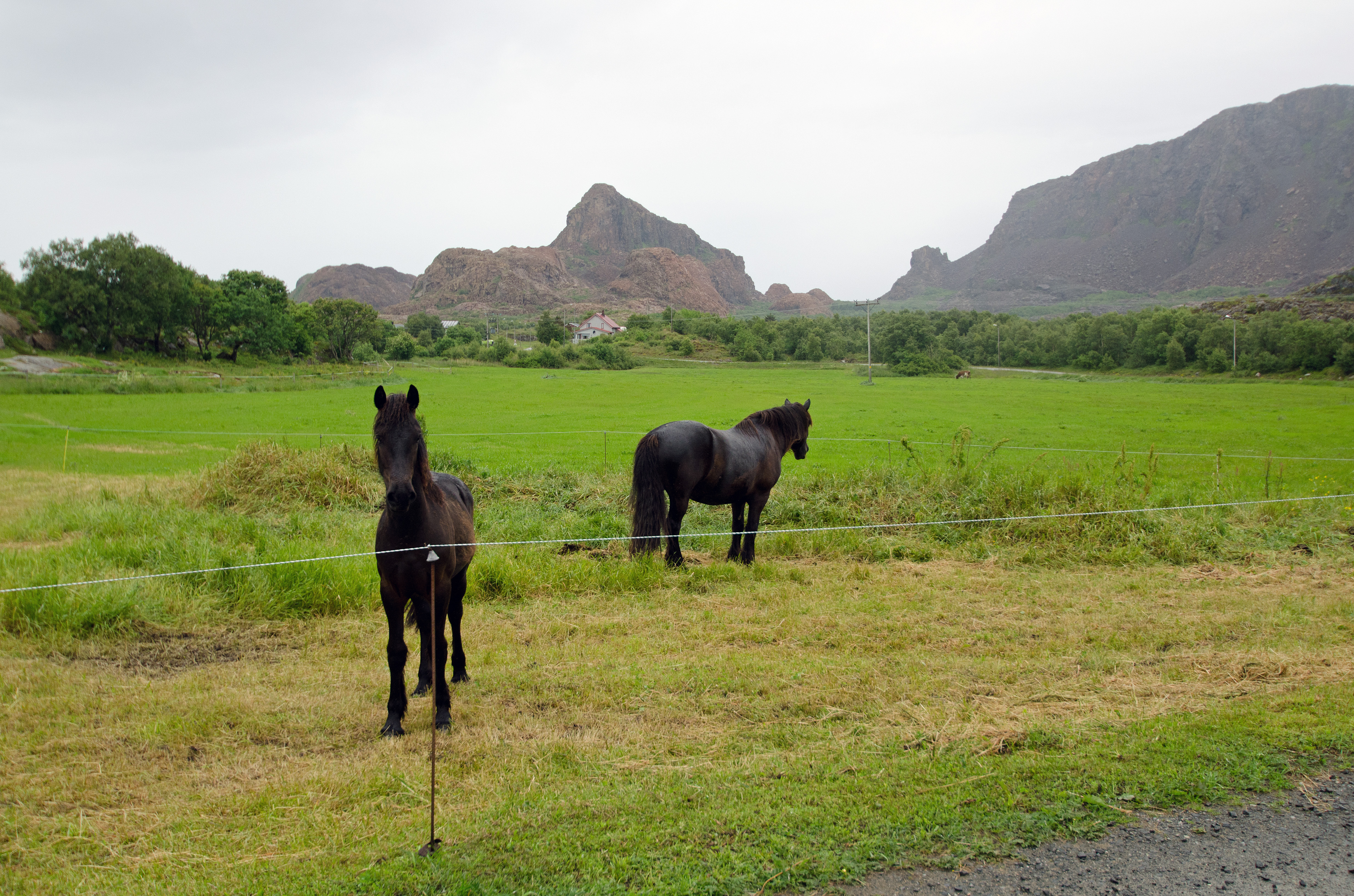 Leka island